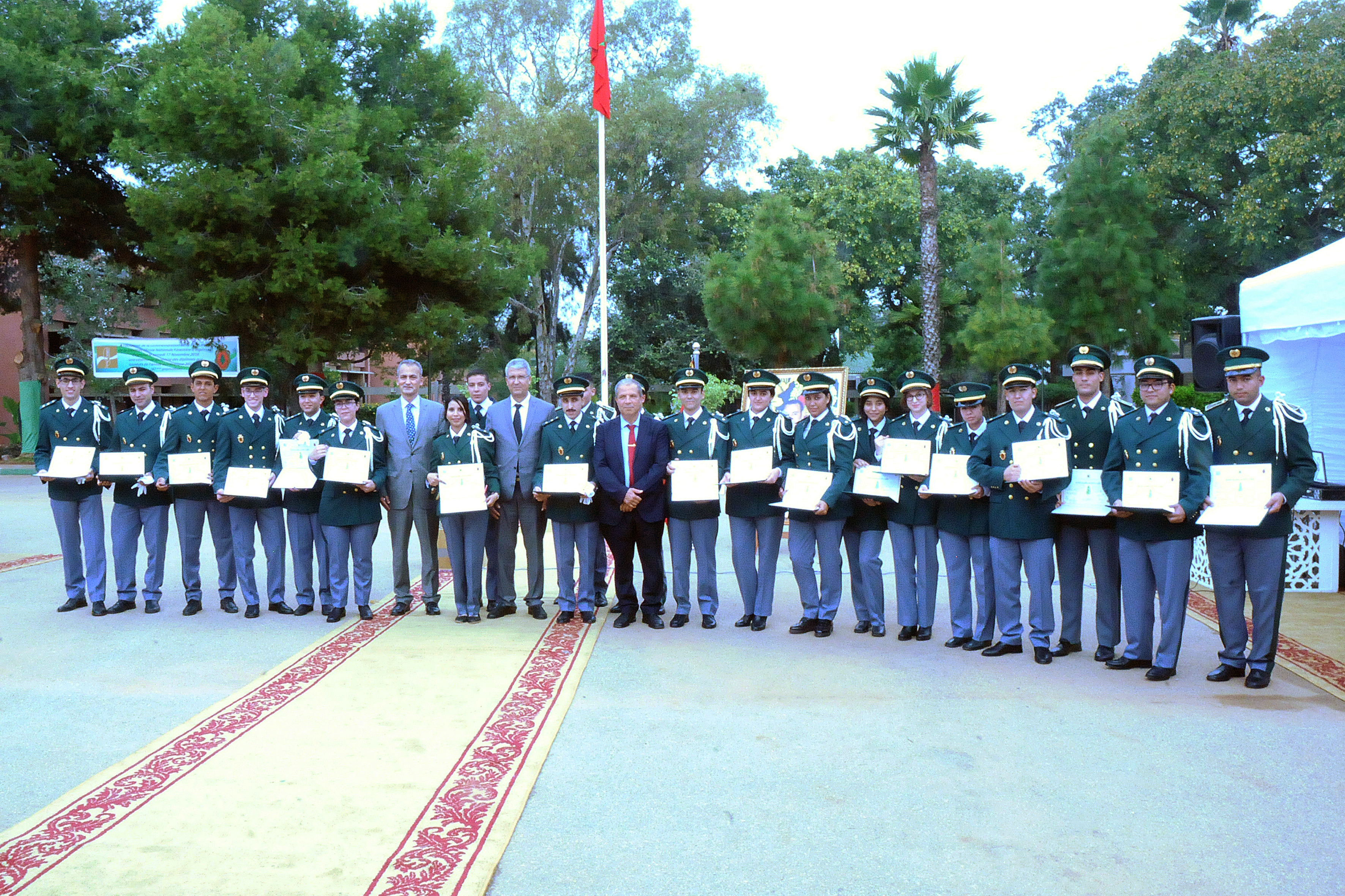 Cérémonie de remise des diplômes aux lauréats de la 47ème promotion de l'année 2017 - 2018 de l'ENFI